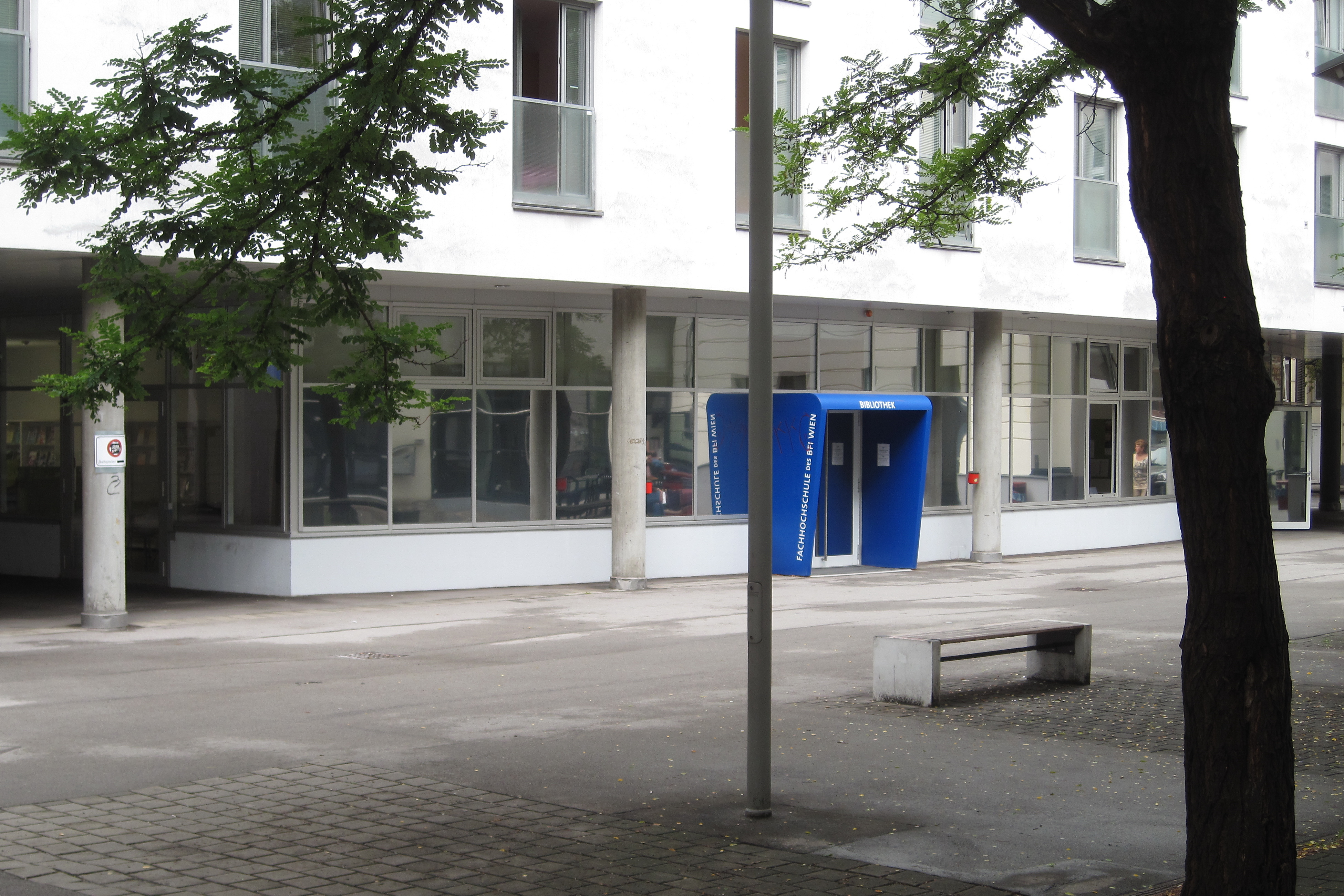 Bibliothek der Fachhochschule des BFI Wien, Wohlmutstraße/Ecke Stuwerstraße in Wien.